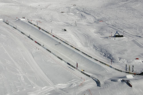 Leysin: Nescafé Freestyle Park